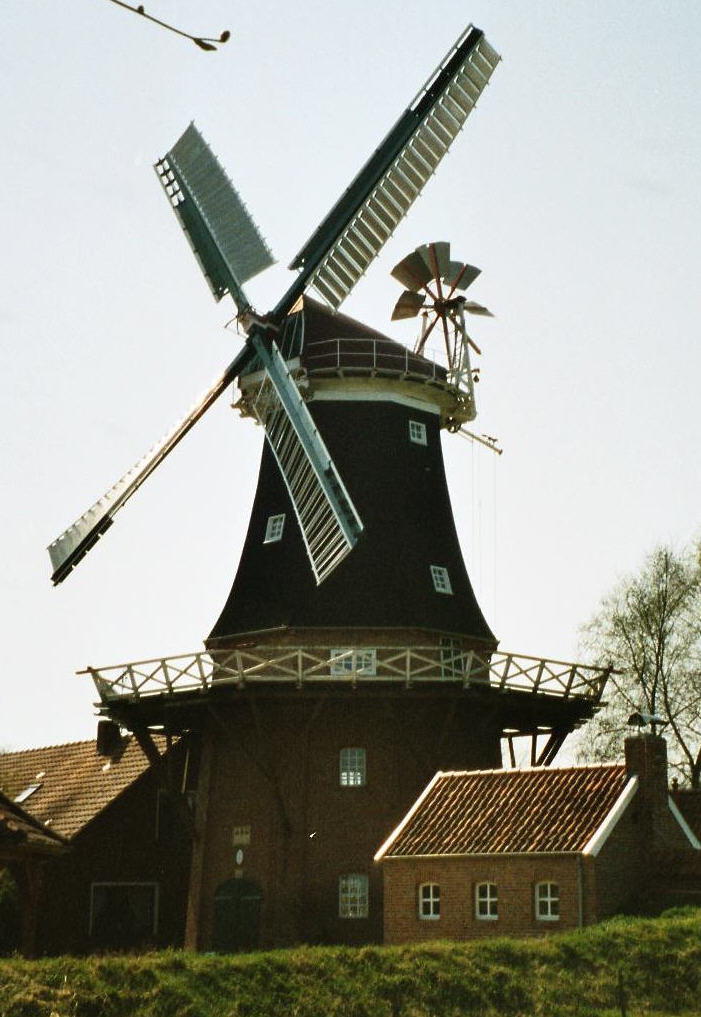 Windmühle (Galerieholländer) in Rhaude (Landkreis Leer / Ostfriesland).